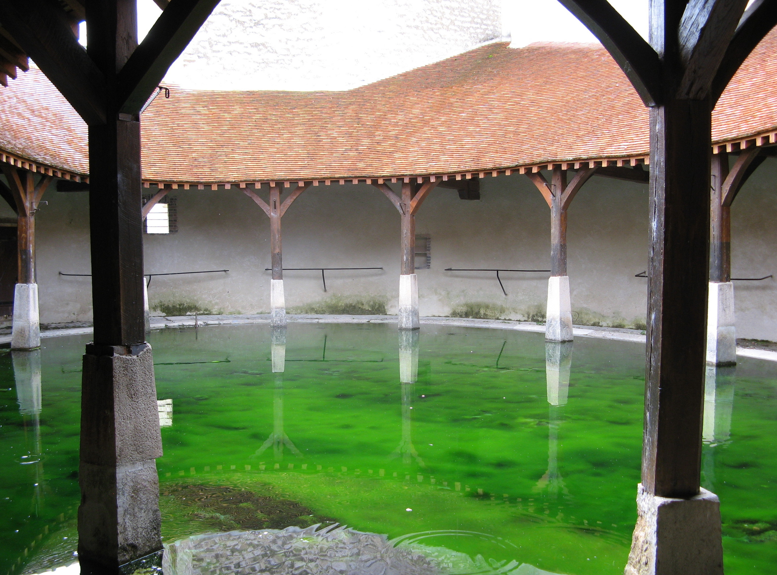 Brienon-sur-Armançon, le lavoir du 18ème siècle en 2008